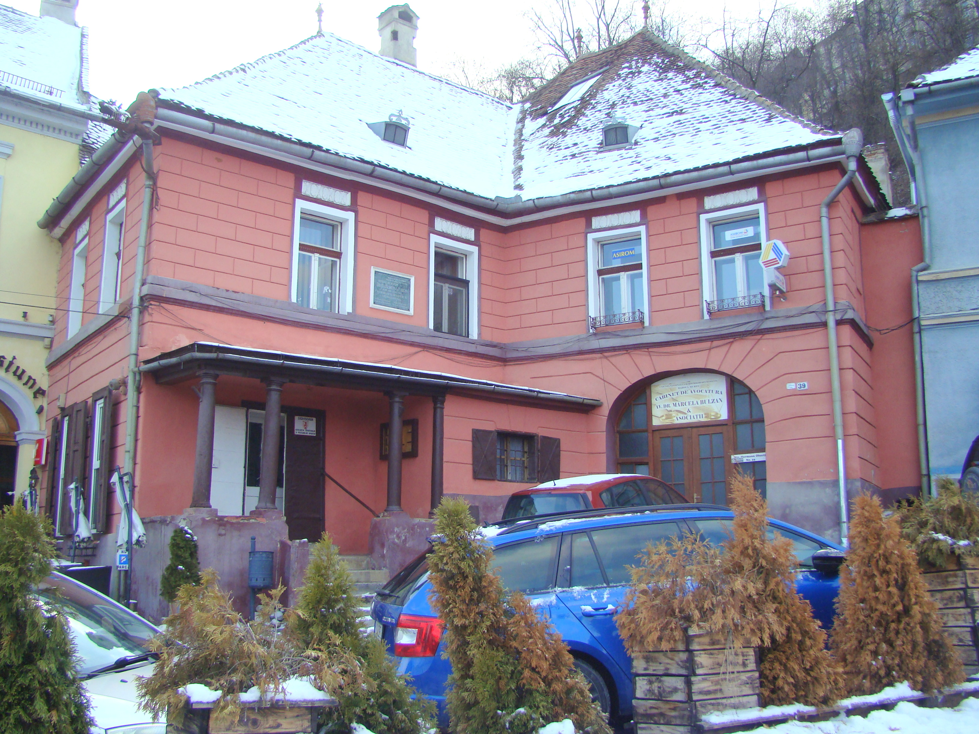 Casa Markus, municipiul Sighișoara, Piața Oberth Hermann 39 sec. XVII - XVIII, sec. XIX